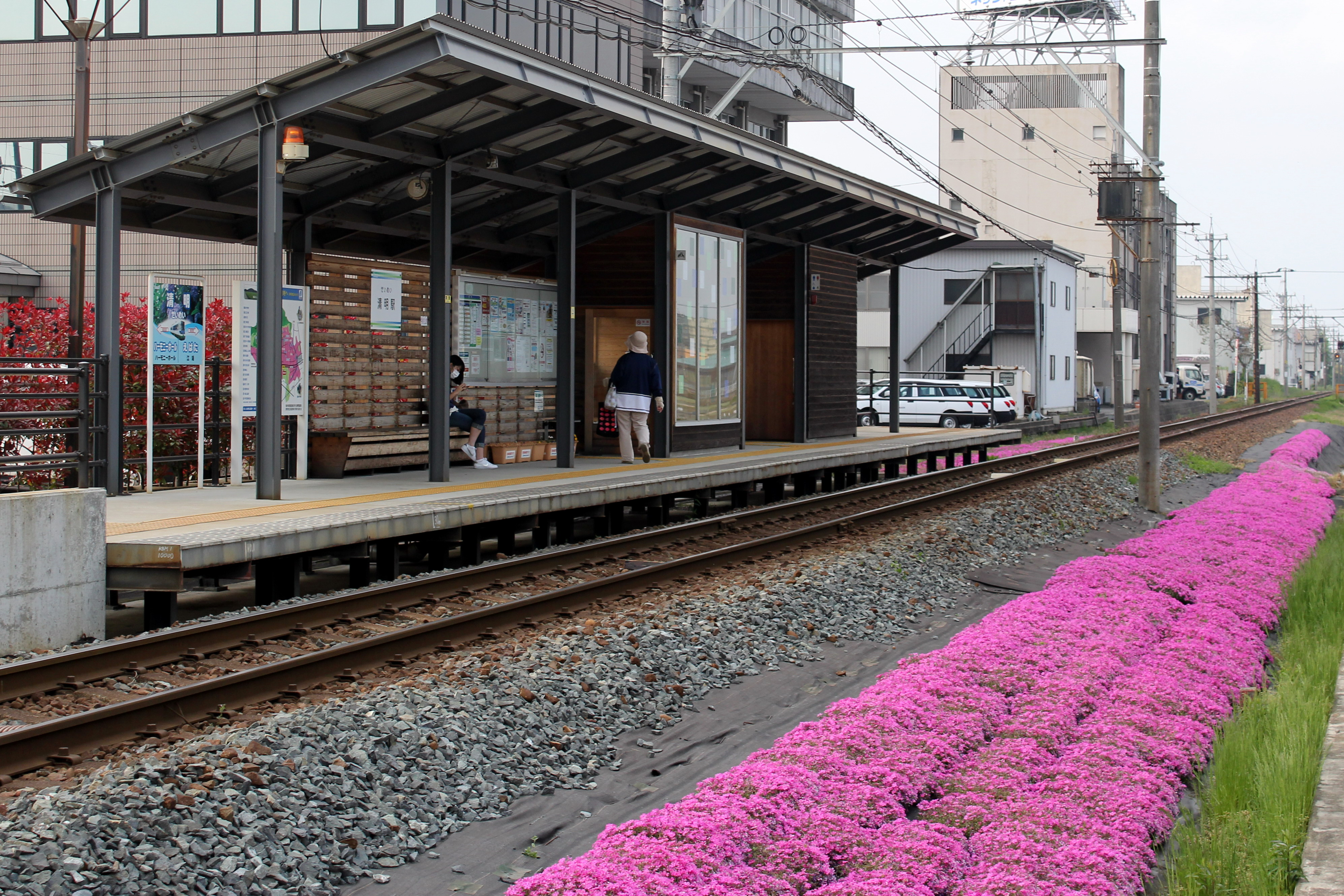 清明駅（福井鉄道）